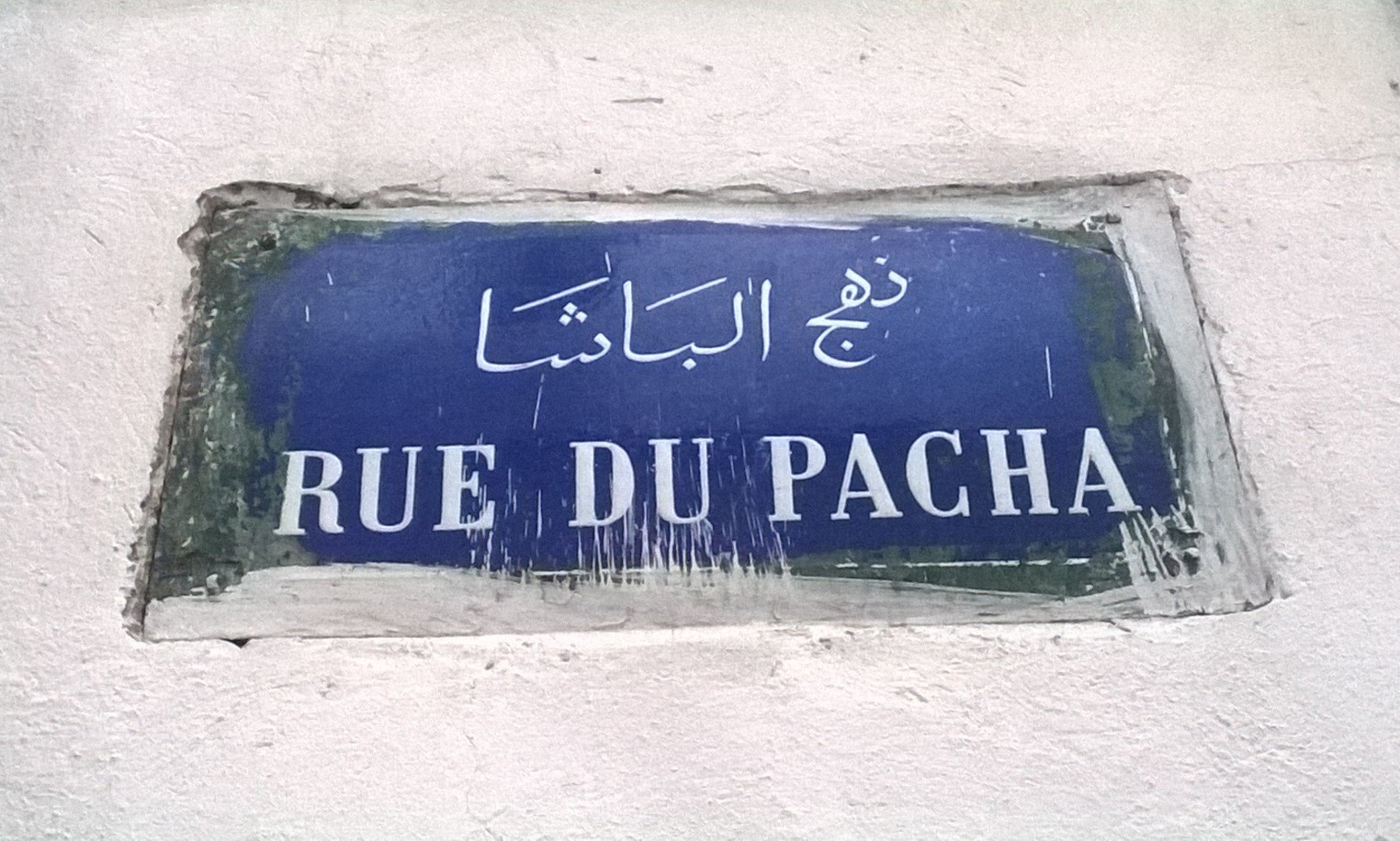 La médina de Tunis مدينة تونس العتيقة